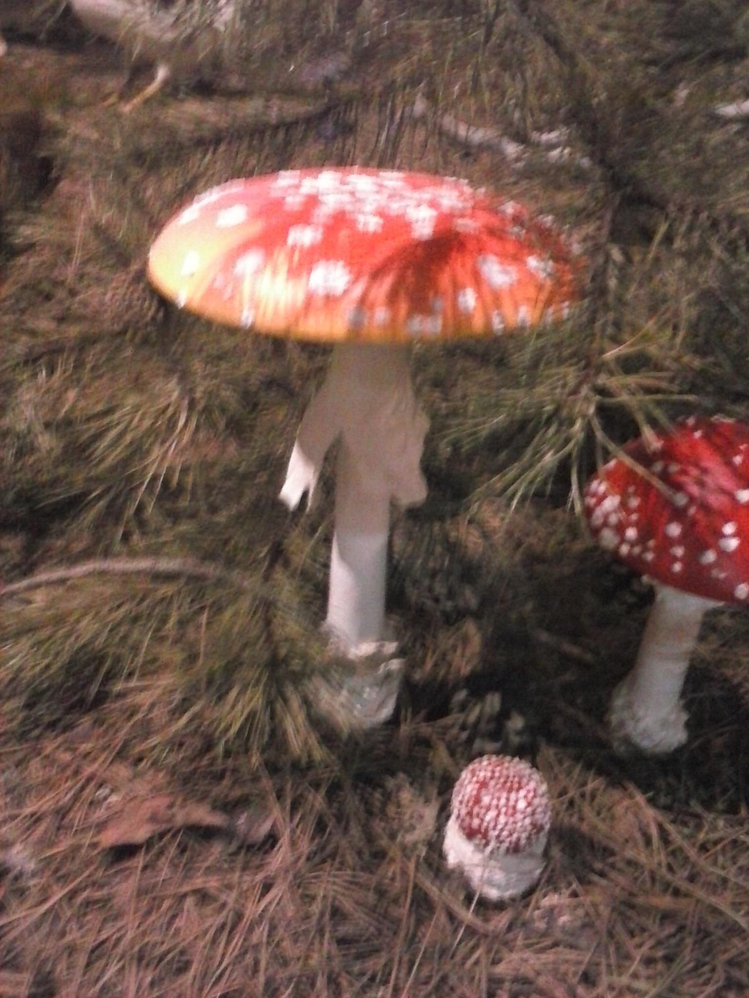 Αμανίτης στο Μουσείο Φυσικής Ιστορίας Μετεώρων